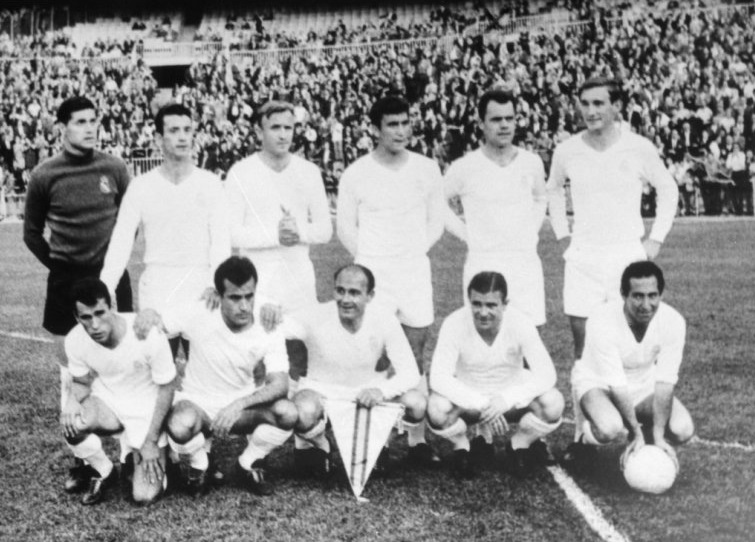 Real Madrid (1964): Vicente, Isidro, Santamaria, Pachín, Muller, Zoco, Amancio, Felo, Di Stefano, Puskas en Gento